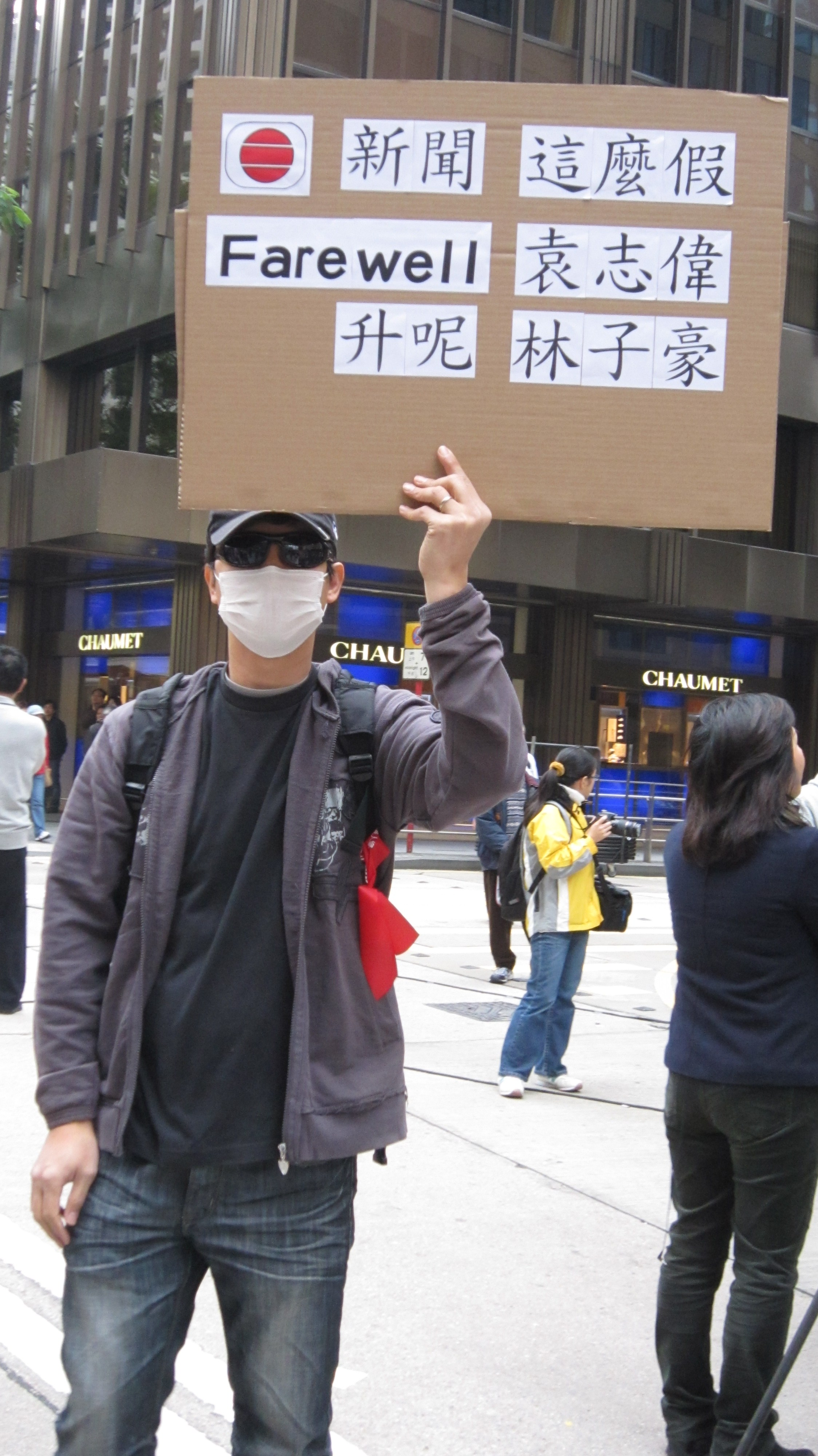 Um homem Hong Kong contra a TVB Um homem de Hong Kong protesto contra o telejornal da TVB 中文（香港）: 香港「事旦男」何家泰抗議無綫新聞